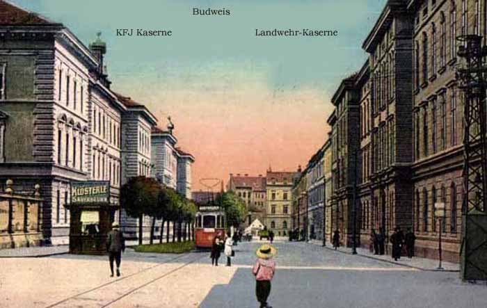 k.k. Landwehr Infanteriekaserne und KFJ Kaserne in Budweis